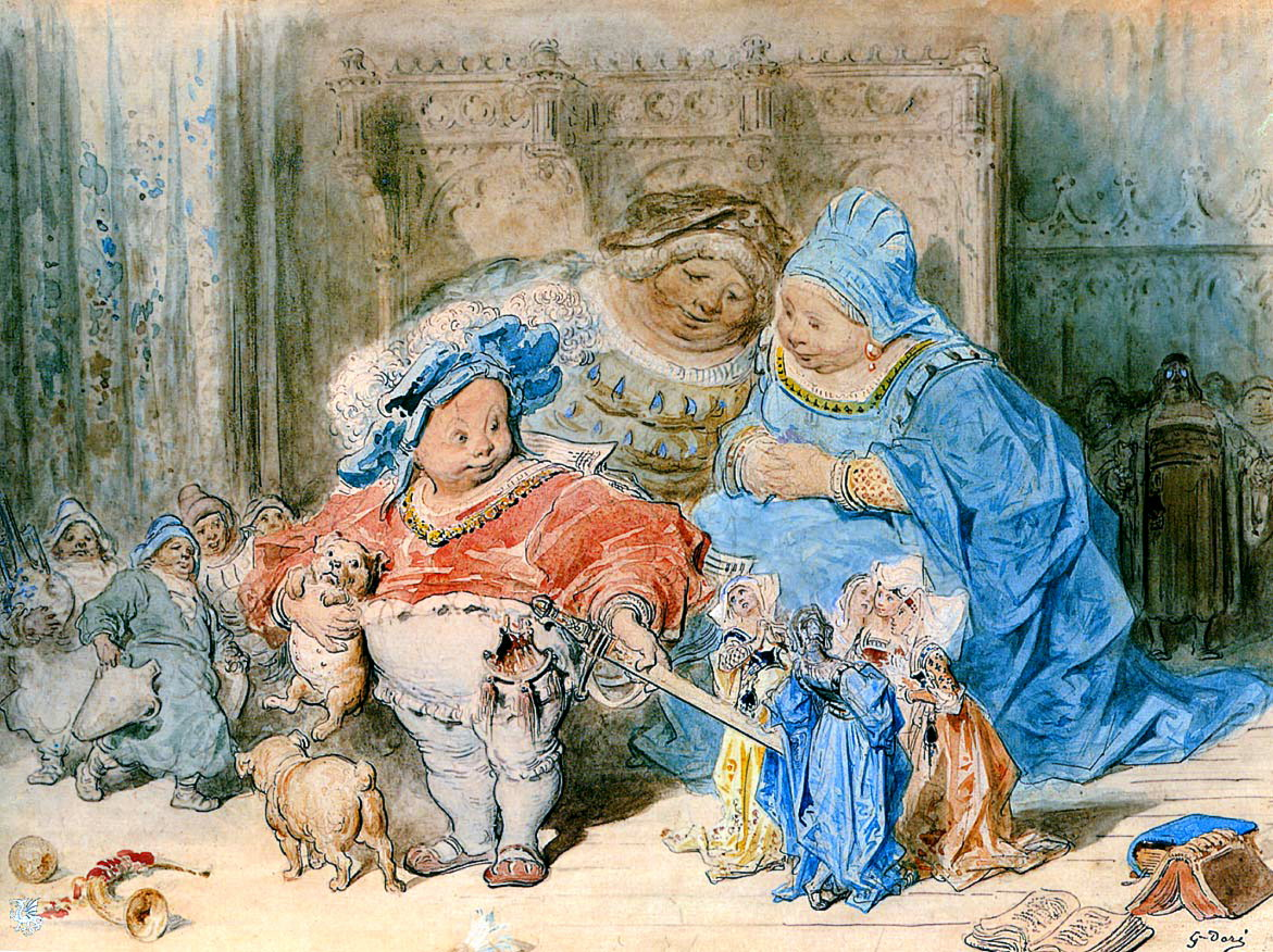 Gustave Doré, L'enfance de Gargantua, projet d'illustration pour les oeuvres de Rabelais, aquarelle, plume et encre noire sur traits de crayon sur papier, Musée d'art moderne et contemporain de Strasbourg.